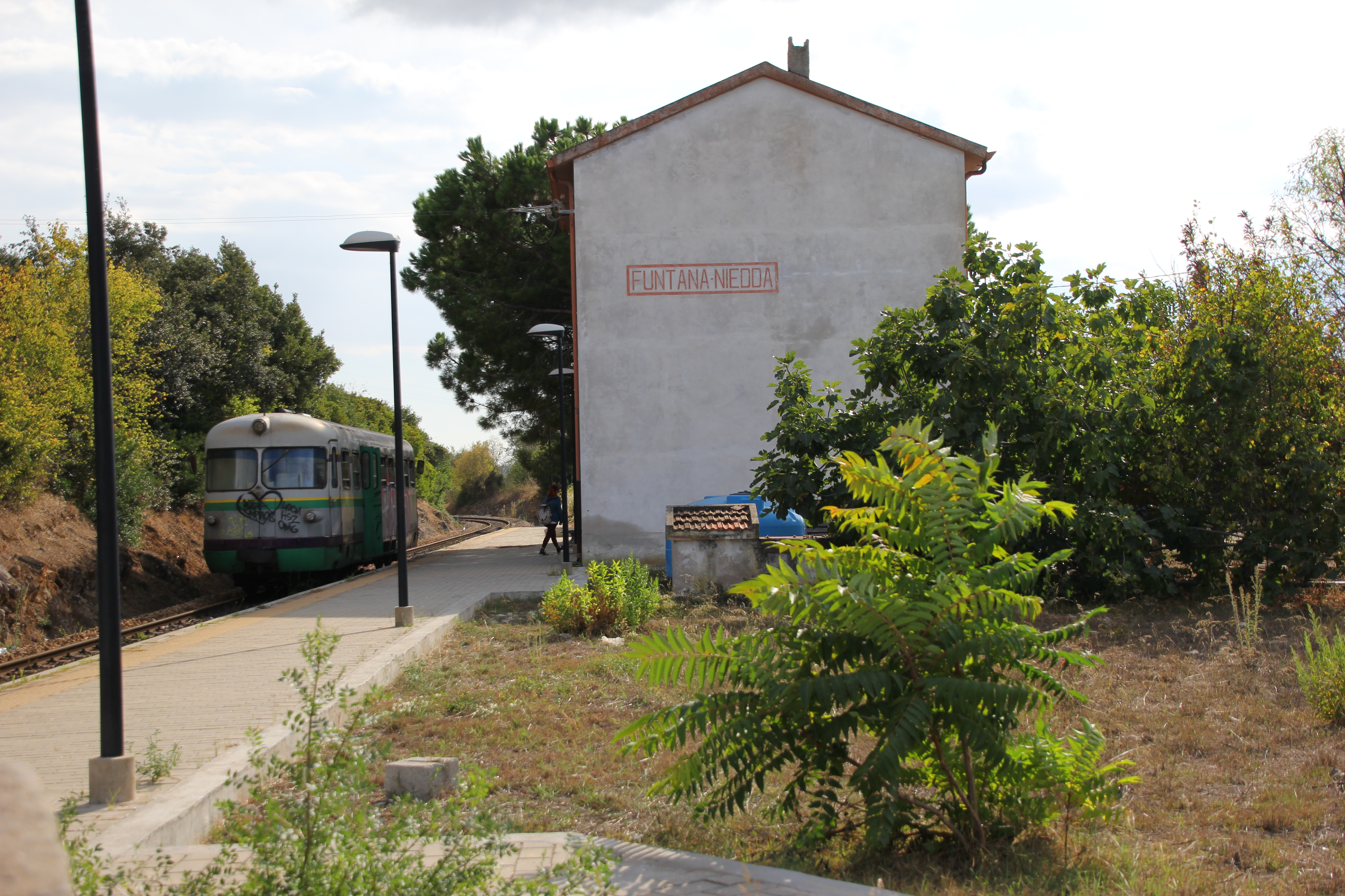 Sorso - Stazione di Funtana Niedda - Ferrovia Sassari-Sorso